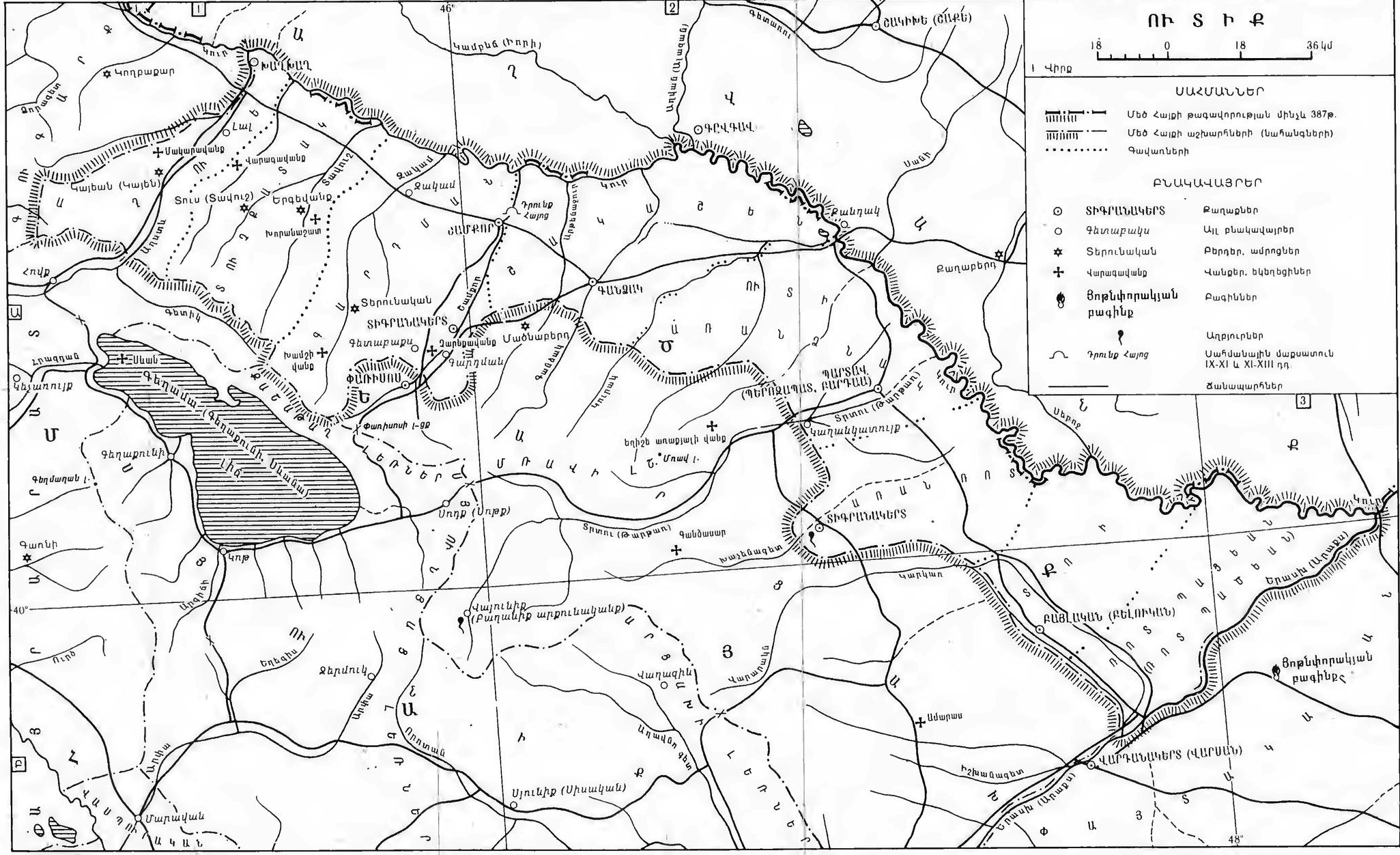 Ուտիք նահանգ